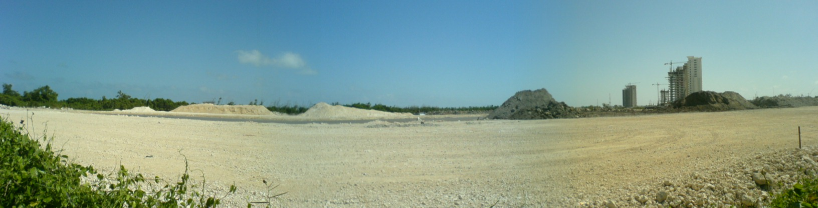 Panorámica de Puerto Cancún y su impacto ambiental